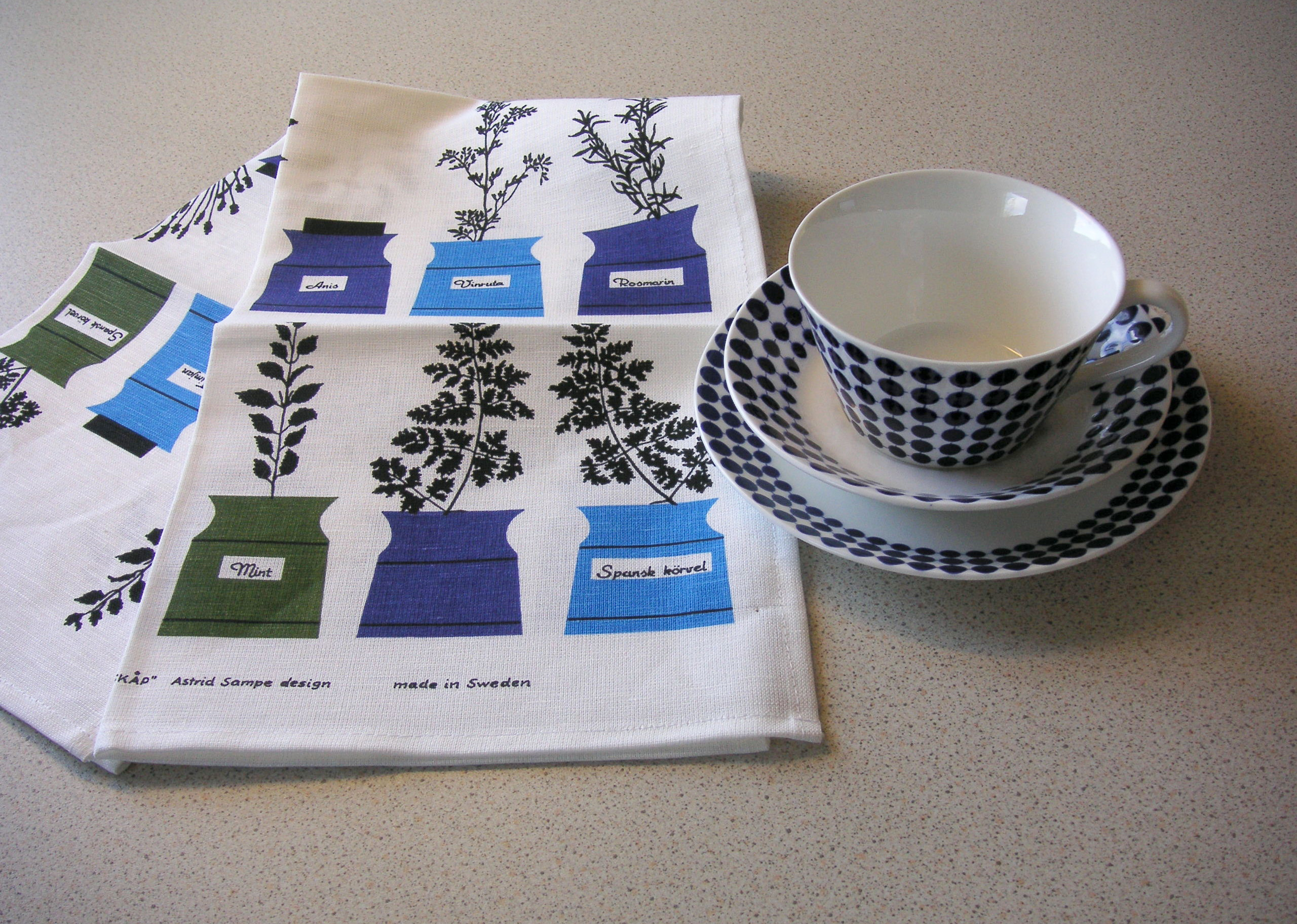 Köksduk "Persons kryddskåp" av Astrid Sampe och tekoppen "Adam" av Stig Lindberg